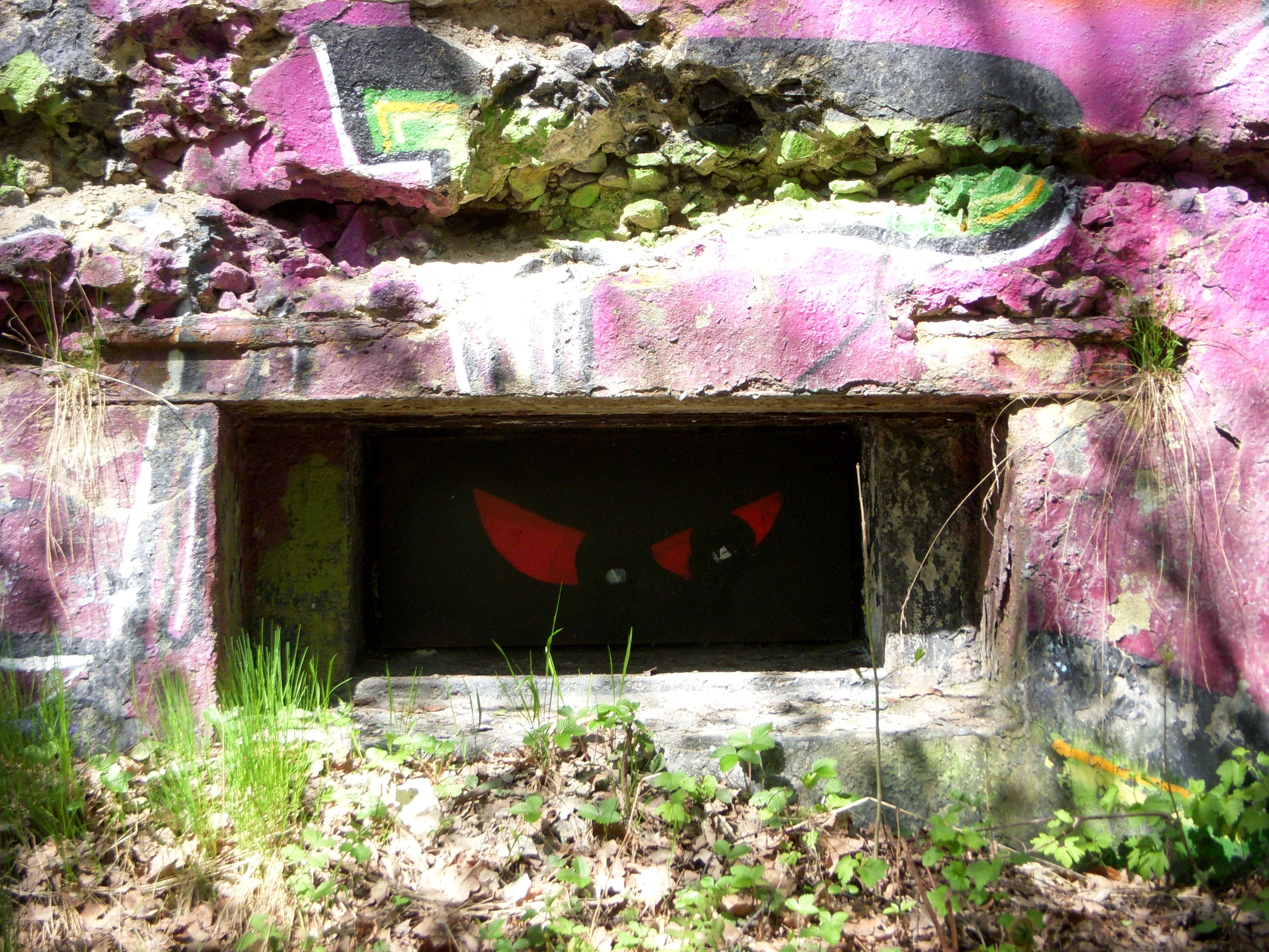 Magelungsfortet från första världskriget i Huddinge kommun, maj 2011